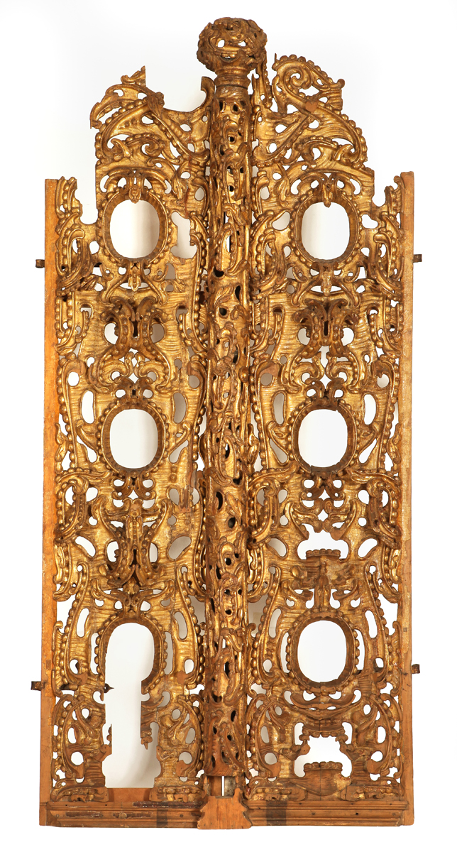 Царская брама, XVI ст.